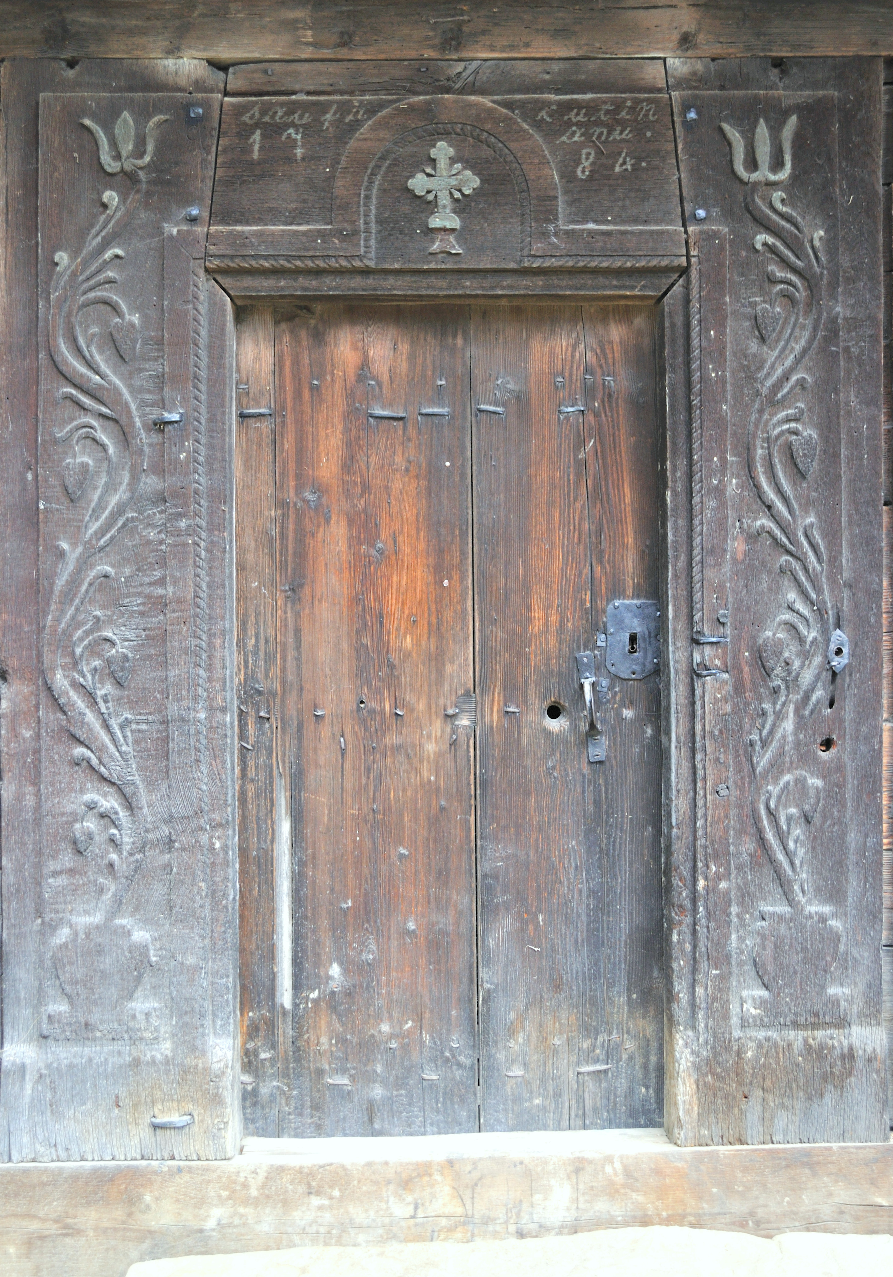 Biserica de lemn „Adormirea Maicii Domnului” din Călinești-Susani, județul Maramureș